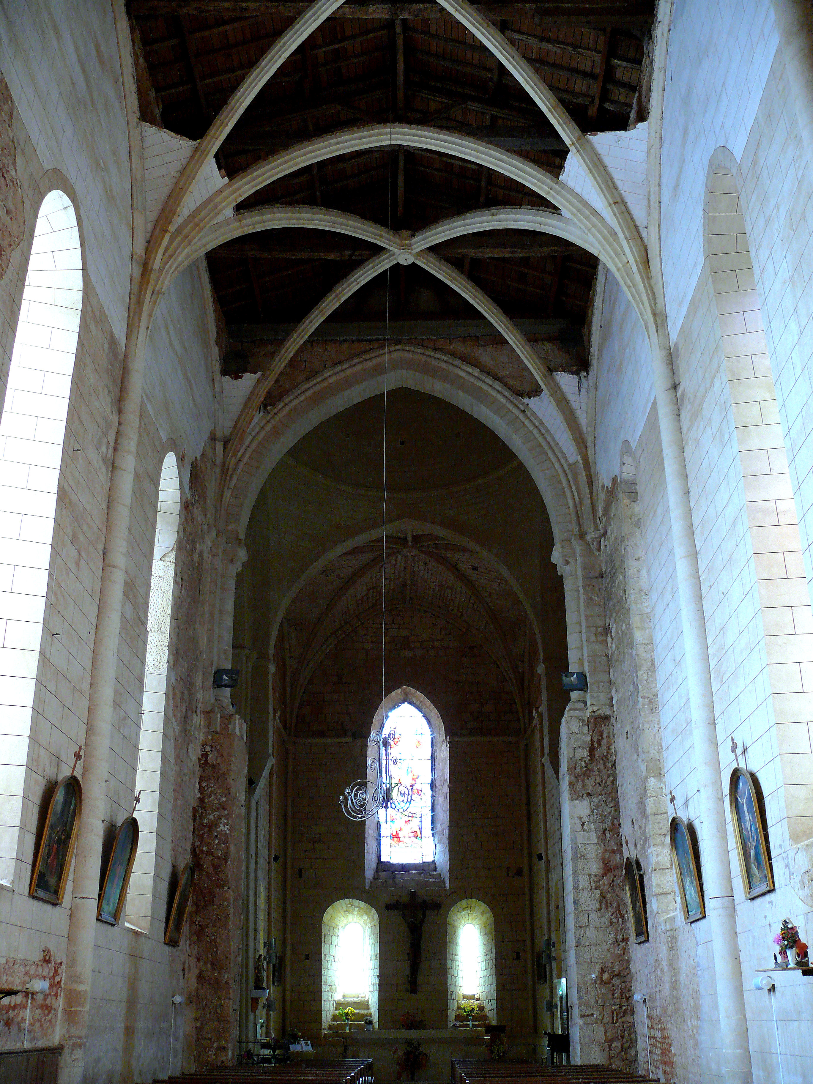 Paunat - Église Saint-Martial - Nef